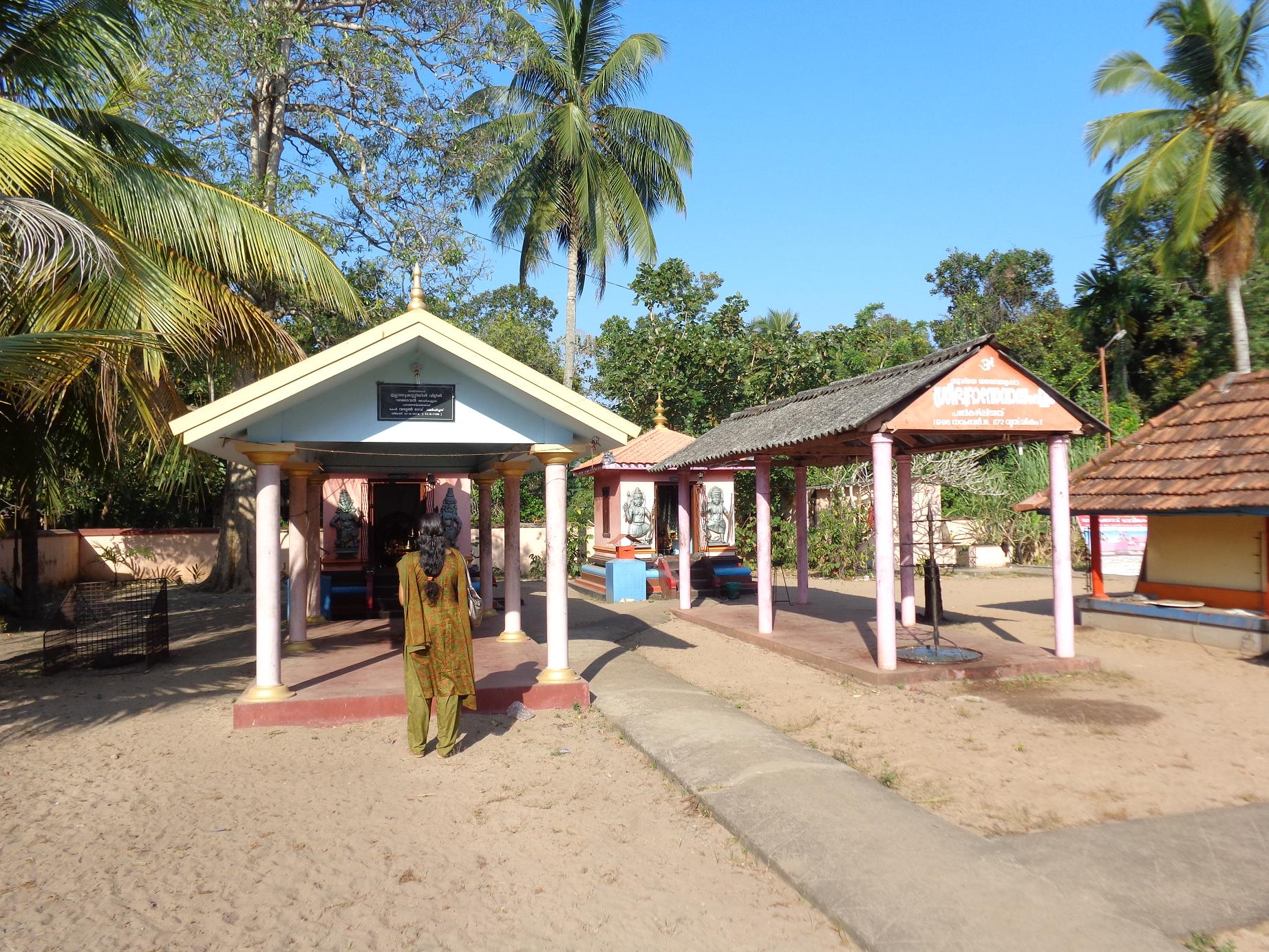 kattanam bharanikavu bhadrakali temple (ayyapa nada)